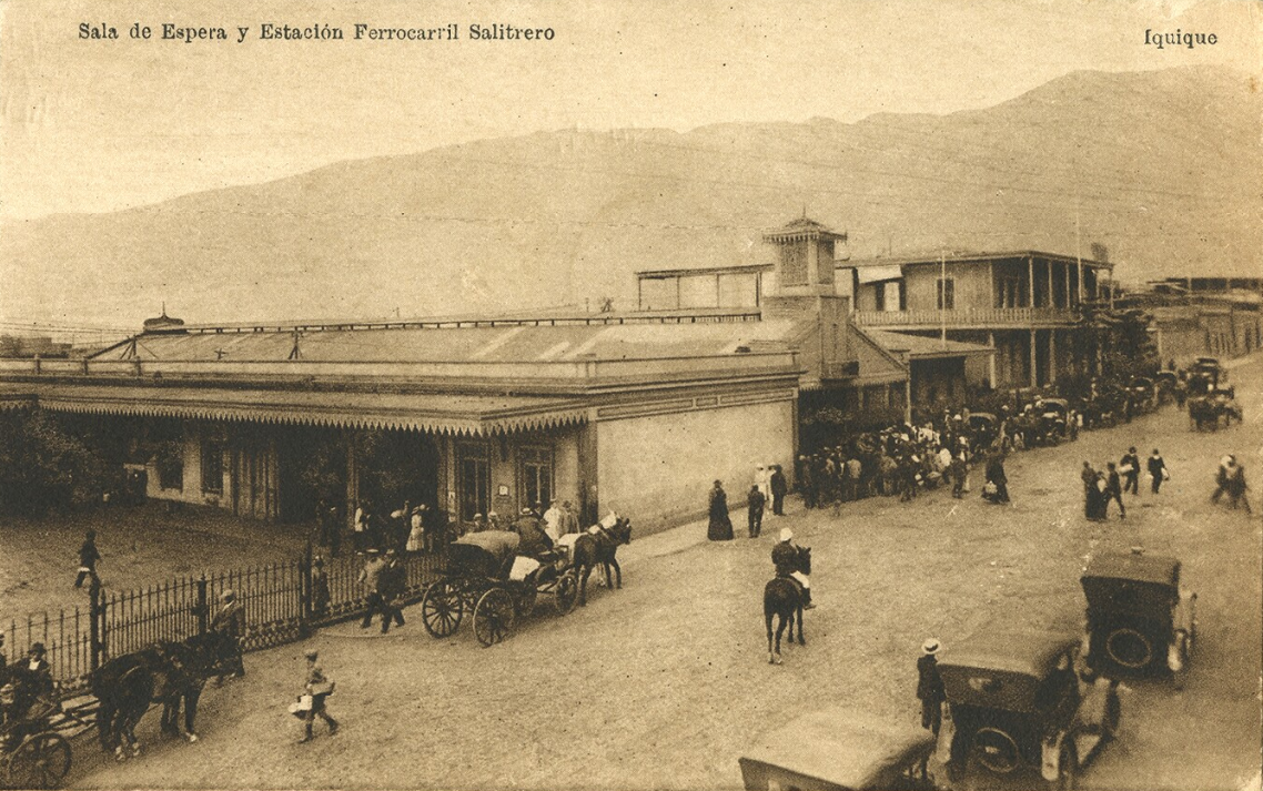 Sala de Espera y Estación de ferrocarril de Iquique, circa 1900.